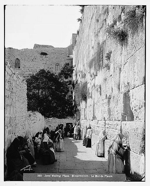 Jews' wailing place הכותל